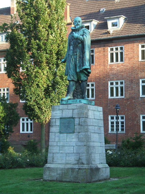 Stralsund, Germany, Lambert-Steinwich-Denkmal